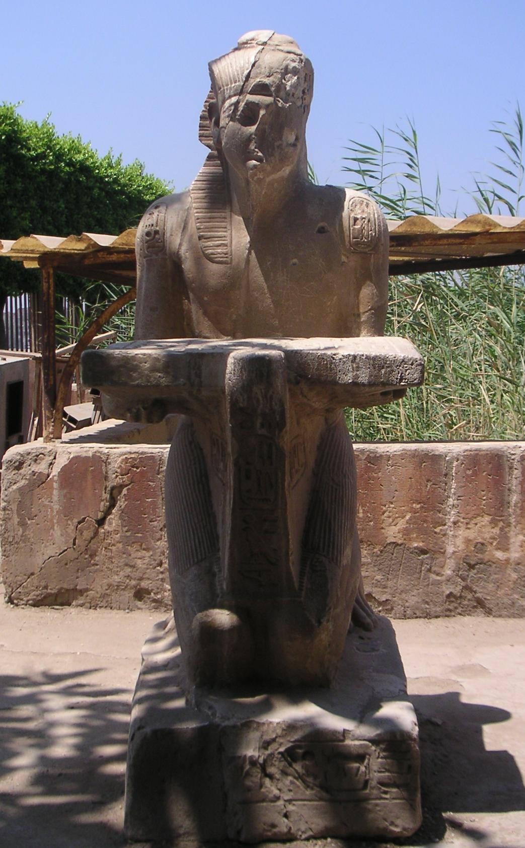 Statue de Séthi II faisant offrande aux dieux Atoum et Shou - XIXe dynastie - Héliopolis - Le Caire user:Neithsabes